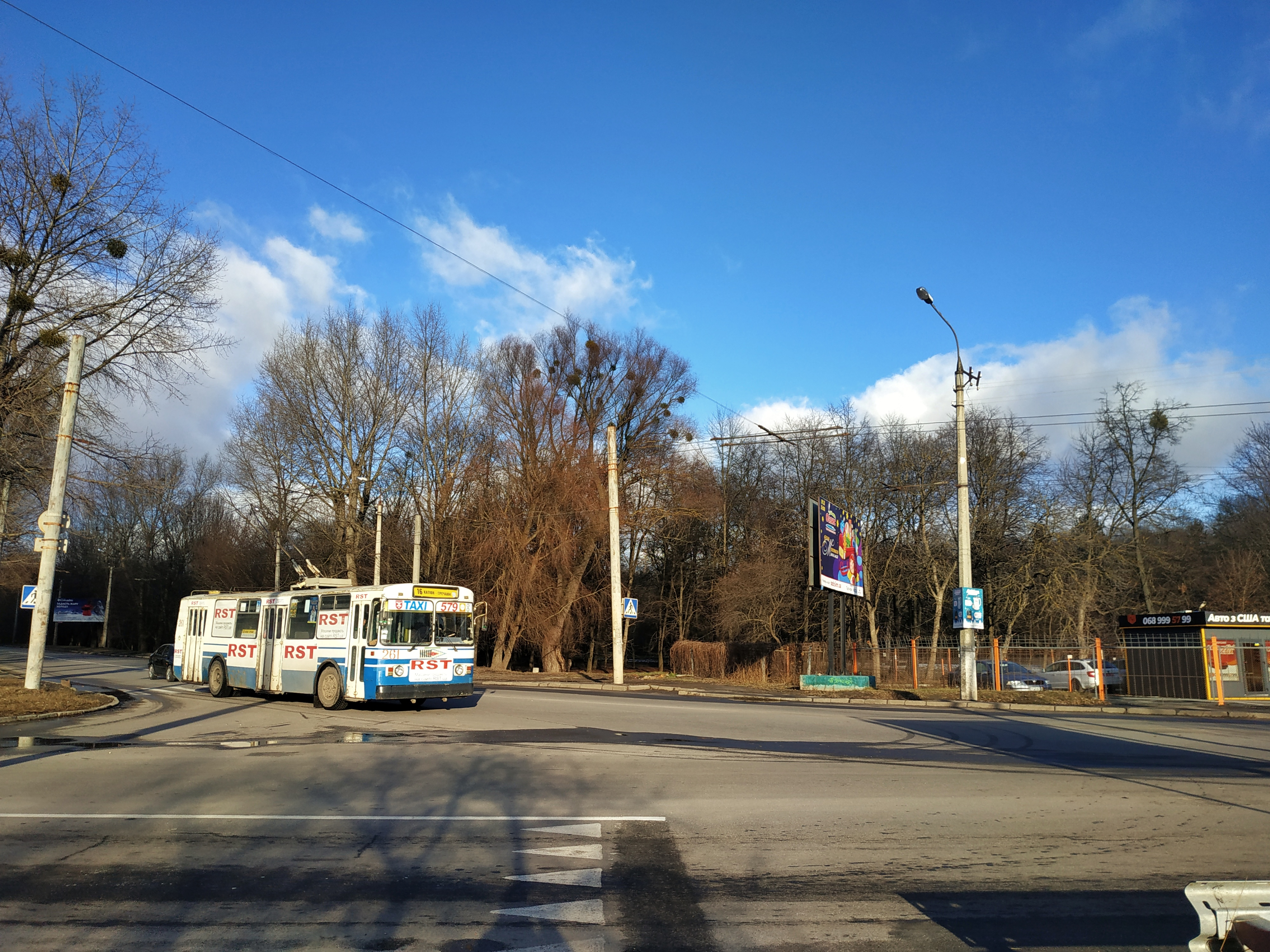 Тролейбус ЗіУ на вулиці Проскурівського Підпілля